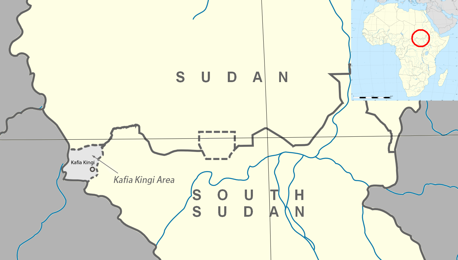 Район Кафия-Кинги